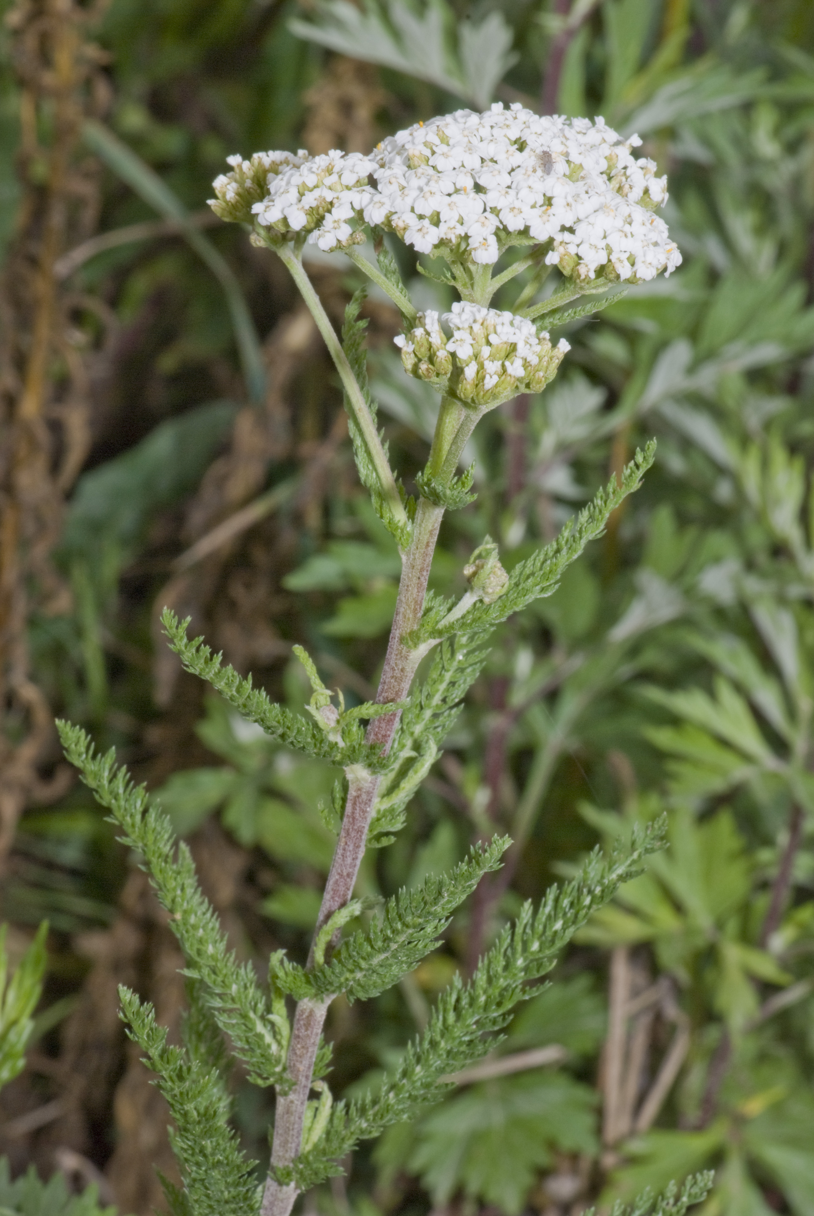 Achillea millefolium - Achillée millefeuille - Vallée de grâce à Amiens (Somme) le 22/06/2007